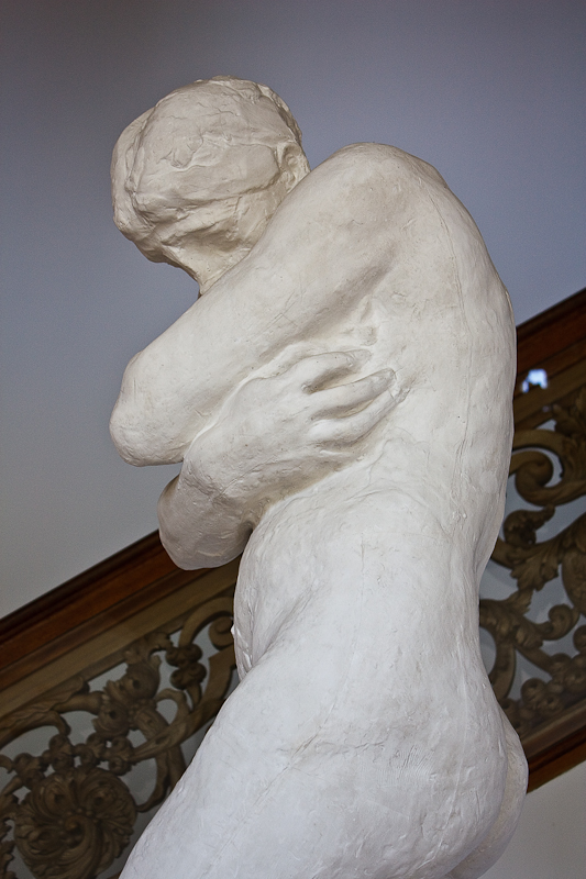 Eva na de zondeval, Rodin (Collectie 15de-17de eeuw, zaal 53) Auguste Rodin Parijs 1840-Meudon 1917 Eva na de Zondeval, 1881 Gips Schenking: J. Hudig 1899 BEK1330 (MK) Vlak na de zondeval buigt Eva schaamtevol het hoofd en slaat de armen om haar borsten. Deze levensgrote, in gips gegoten 'Eva', werd in 1899 na Rodin-tentoonstelling in Rotterdam aan het museum geschonken. Het was de eerste Rodin in een Nederlandse collectie. Naar aanleiding van de schenking bezocht Rodin zelf Museum Boijmans. Auguste Rodin 1840 Paris-Meudon 1917 Eve after the Fall, 1881 Plaster Donation: J. Hudig 1899 BEK1330 (MK) Shortly after the Fall, Eva bends her head with shame and covers her breasts. This life-size, cast in plaster 'Eve' was given to the museum in 1899 after the Rodin exhibition. It was the first Rodin in a Dutch collection. Following the gift itself, Rodin paid Museum Boijmans a visit.